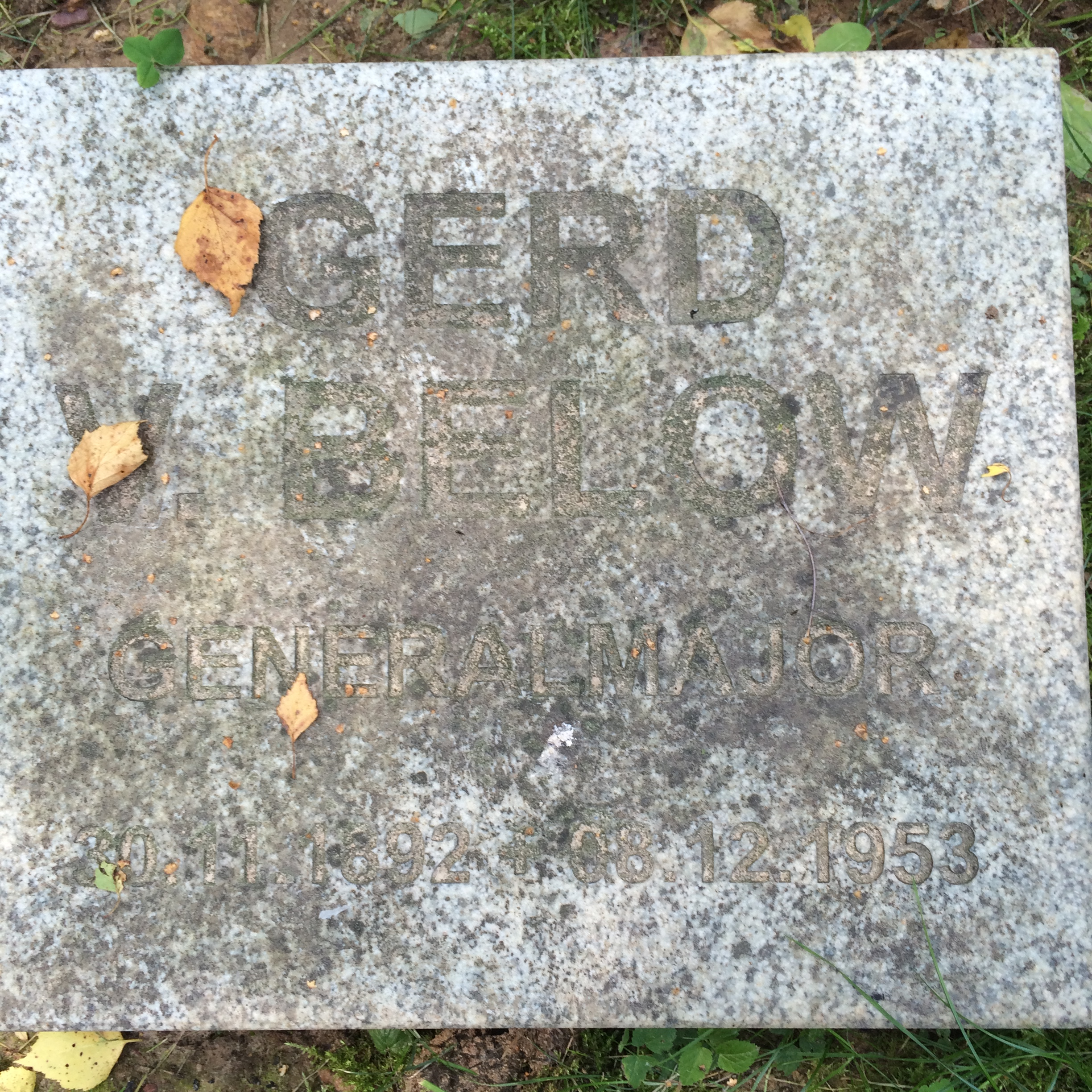 Tombstone; Cherntsy Memorial